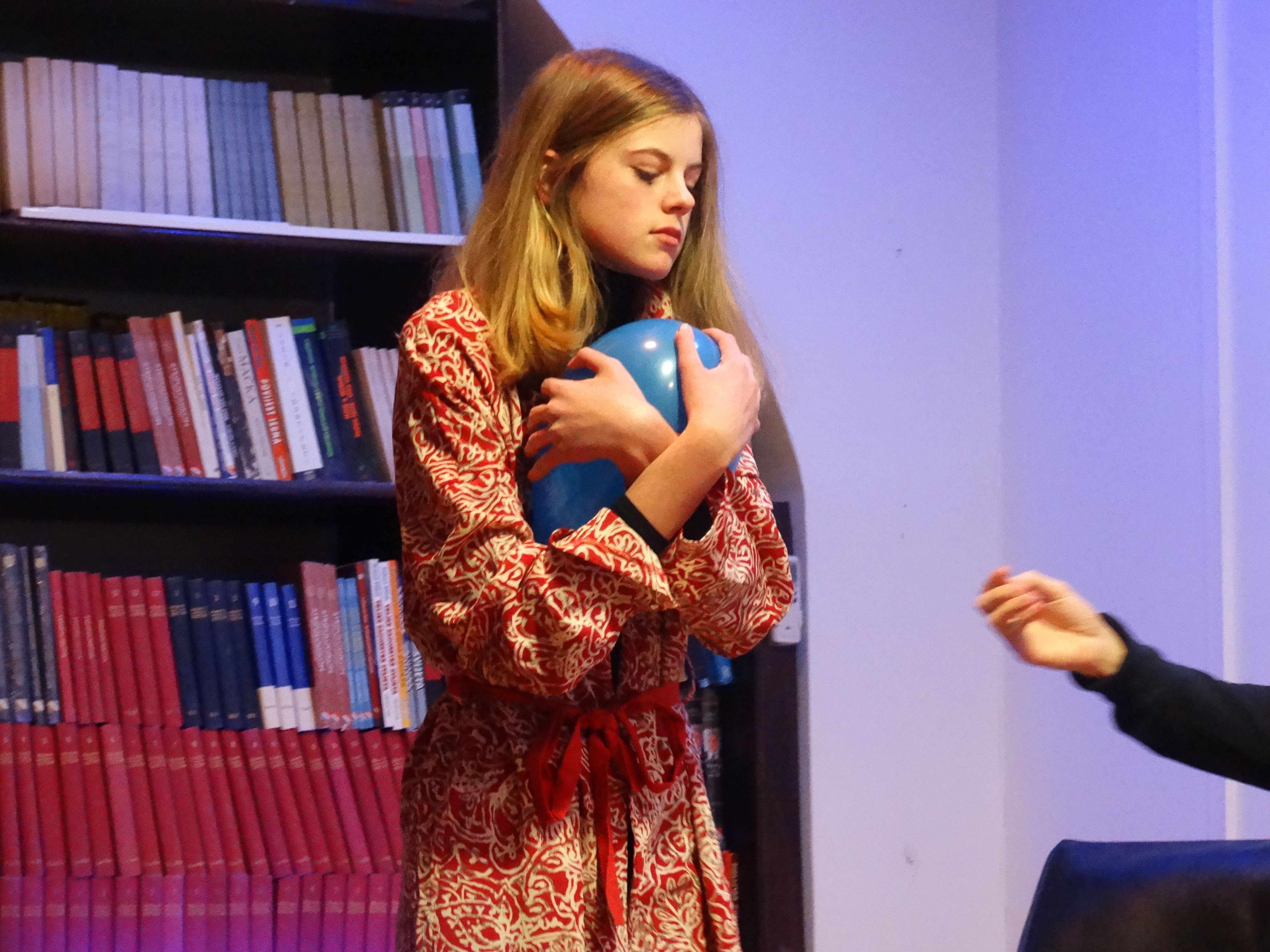 Mate Matišić